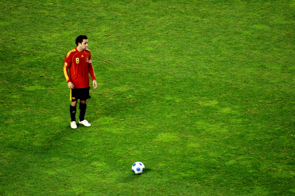 Xavi Hernández en un partido con la selección española de fútbol